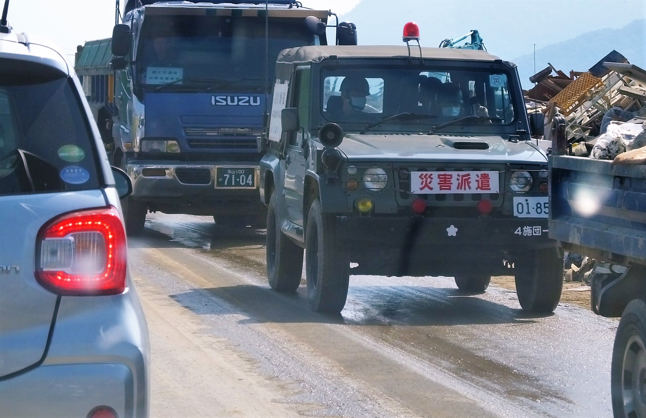 2018-07-14 Floods of Mabi, Kurashiki City 倉敷市真備 平成30年7月豪雨被害